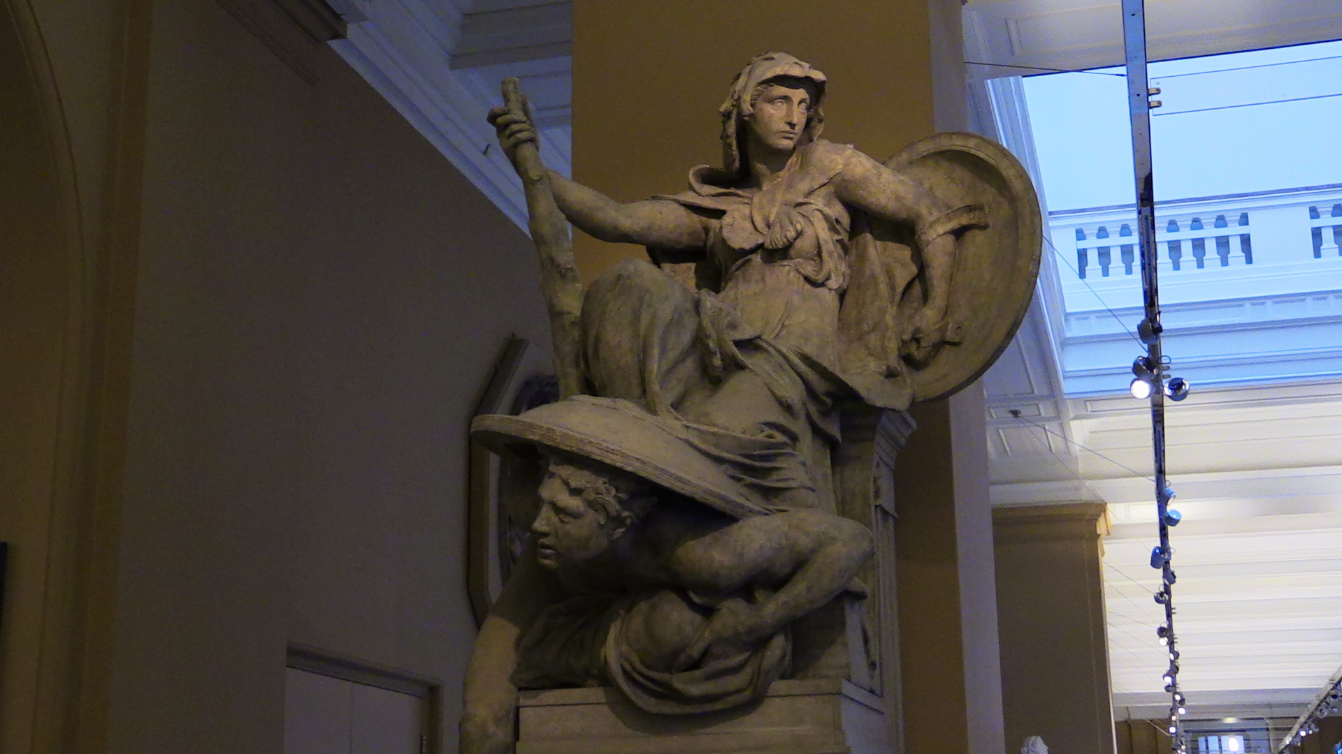 Аҧсшәа